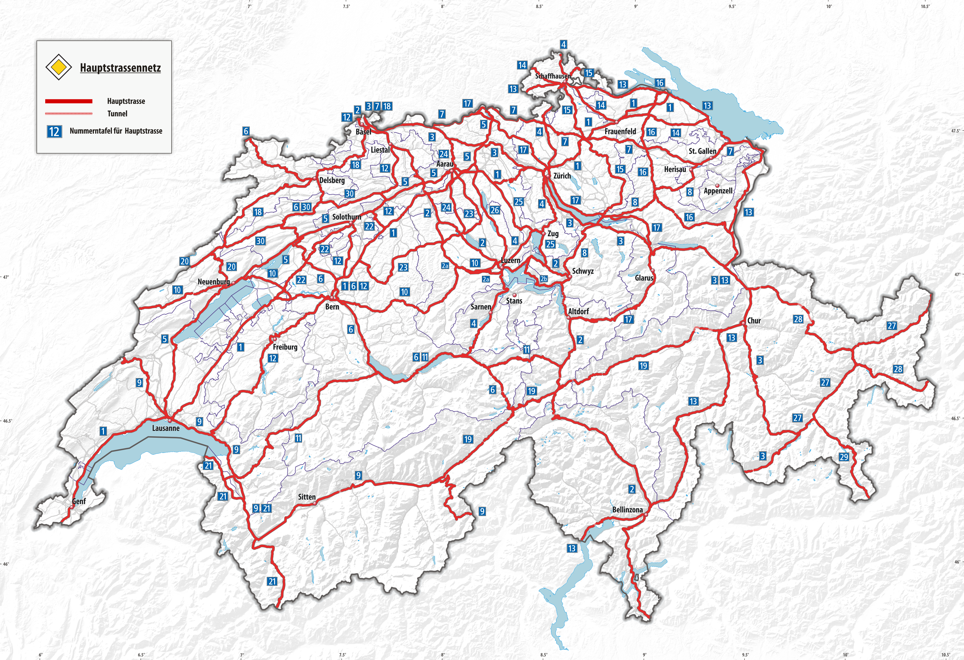 Hauptstrassennetz der Schweiz Stand 2019